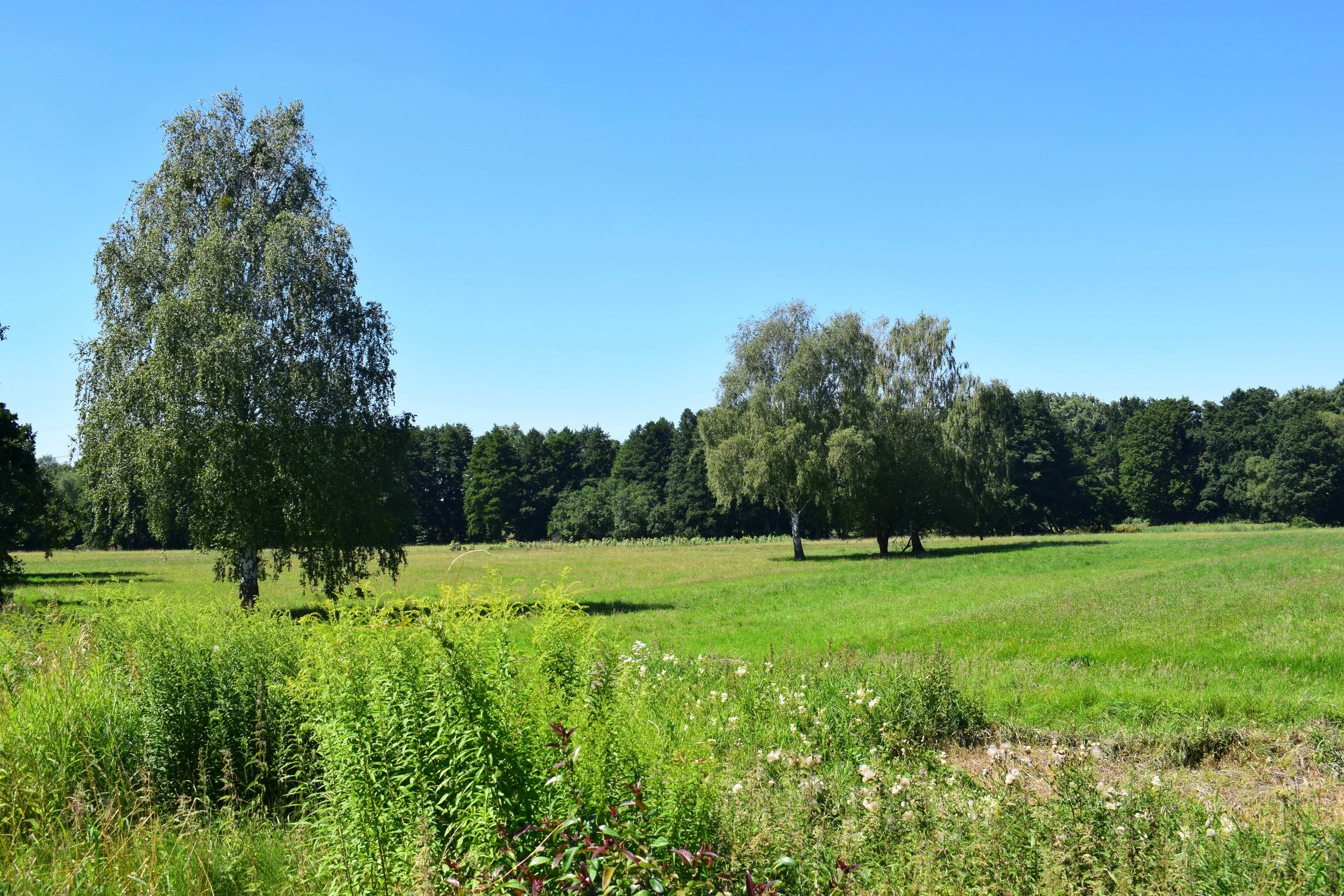 Im Naturschutzgebiet Wiesengrund, Altlandsberg.